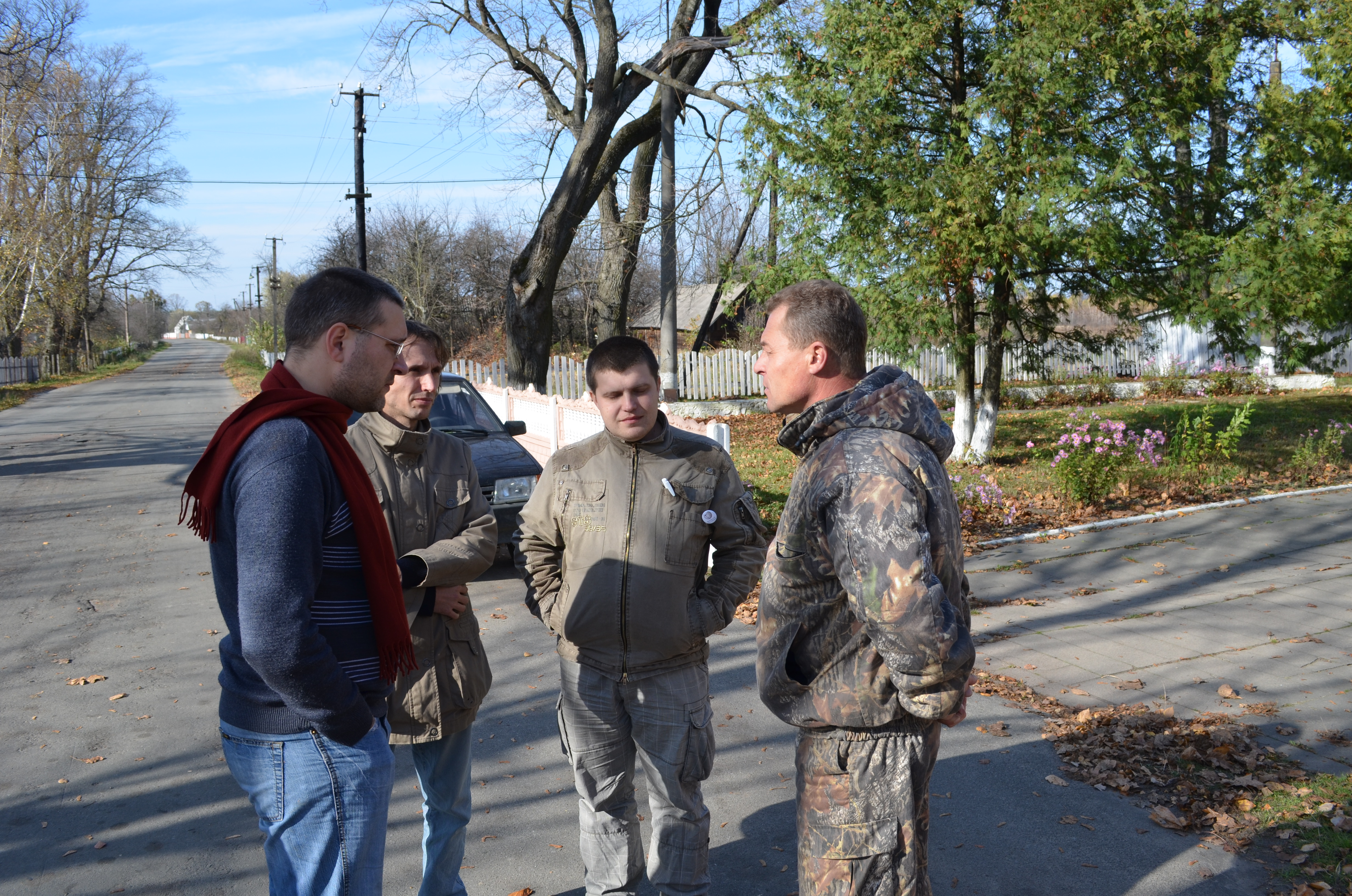 Розмова з сільським головою Бондарівської сільської ради